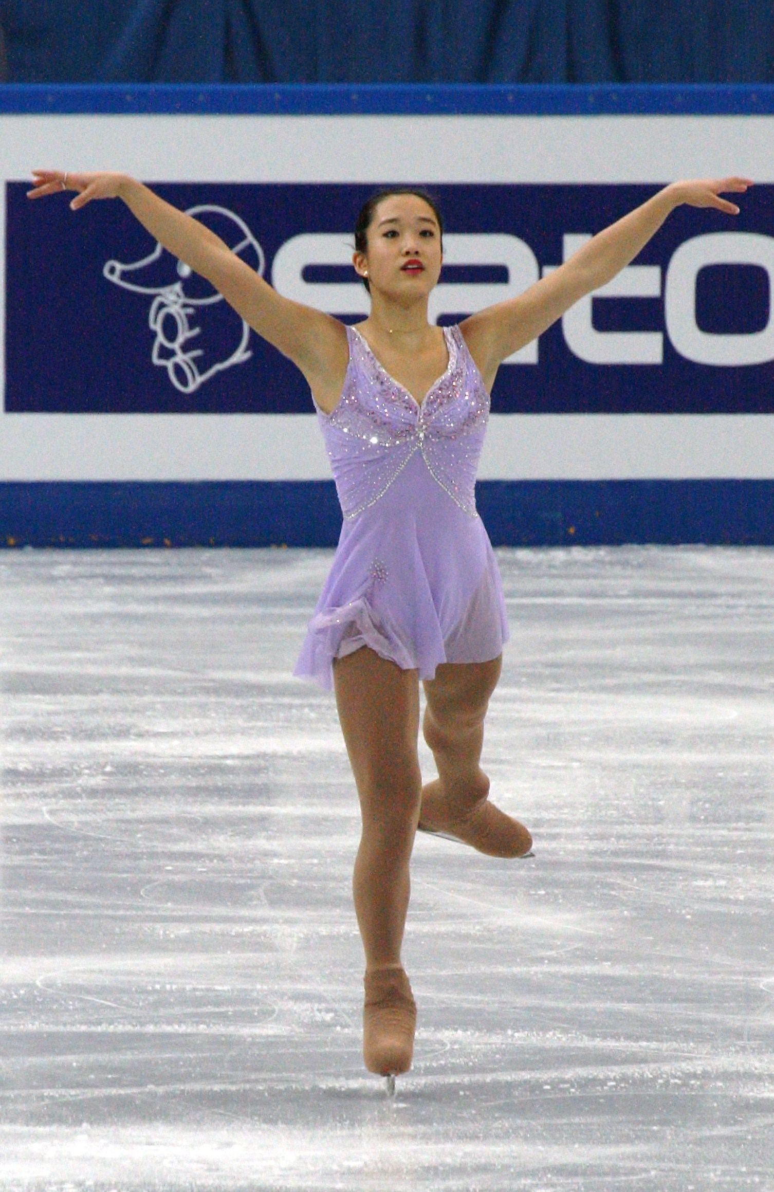 Анжела Ванг (США) на финале Гран-при среди юниоров 2012-2013. Произвольная программа.